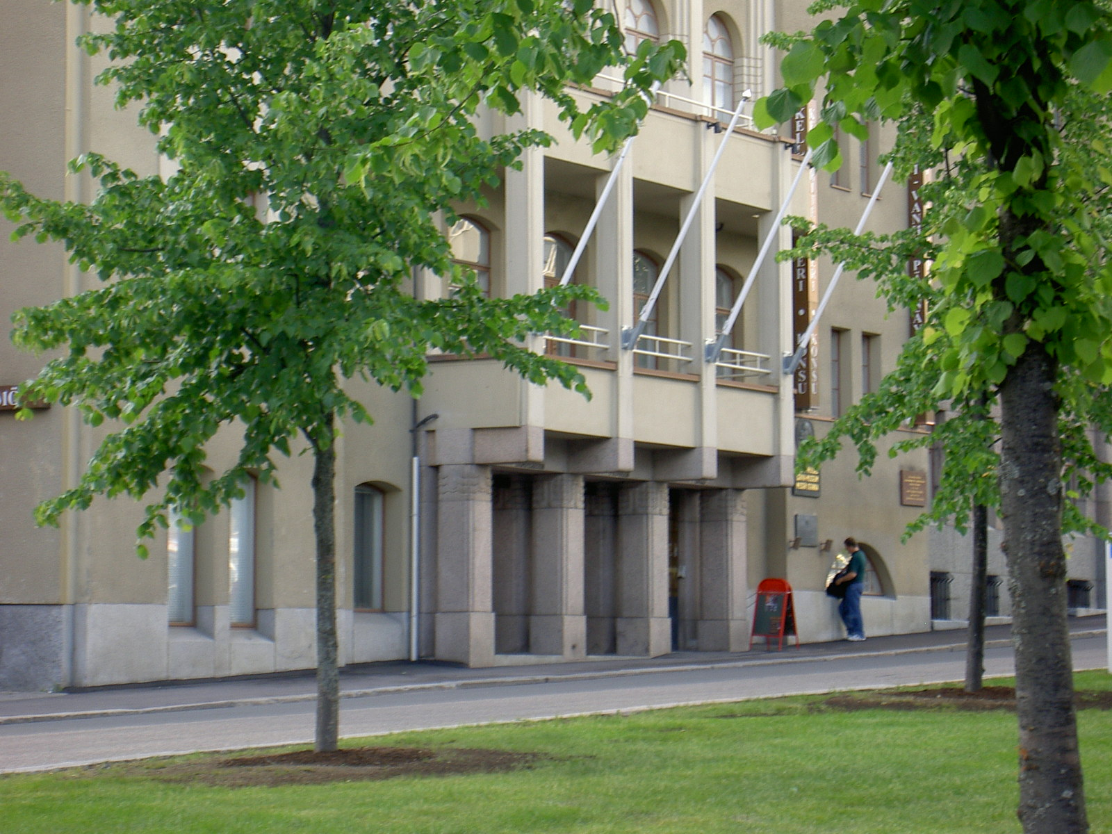 Lenin-museum in Tampere, Finland.